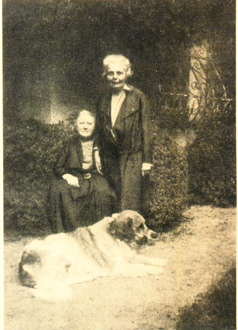 Margarete Behm (links), Margarete Wolff Urlaub in Schloss Labers 1926